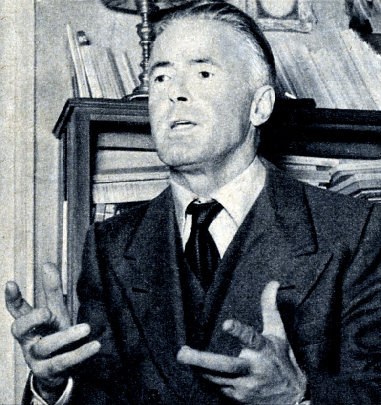 photo from magazine Radiocorriere (1955)